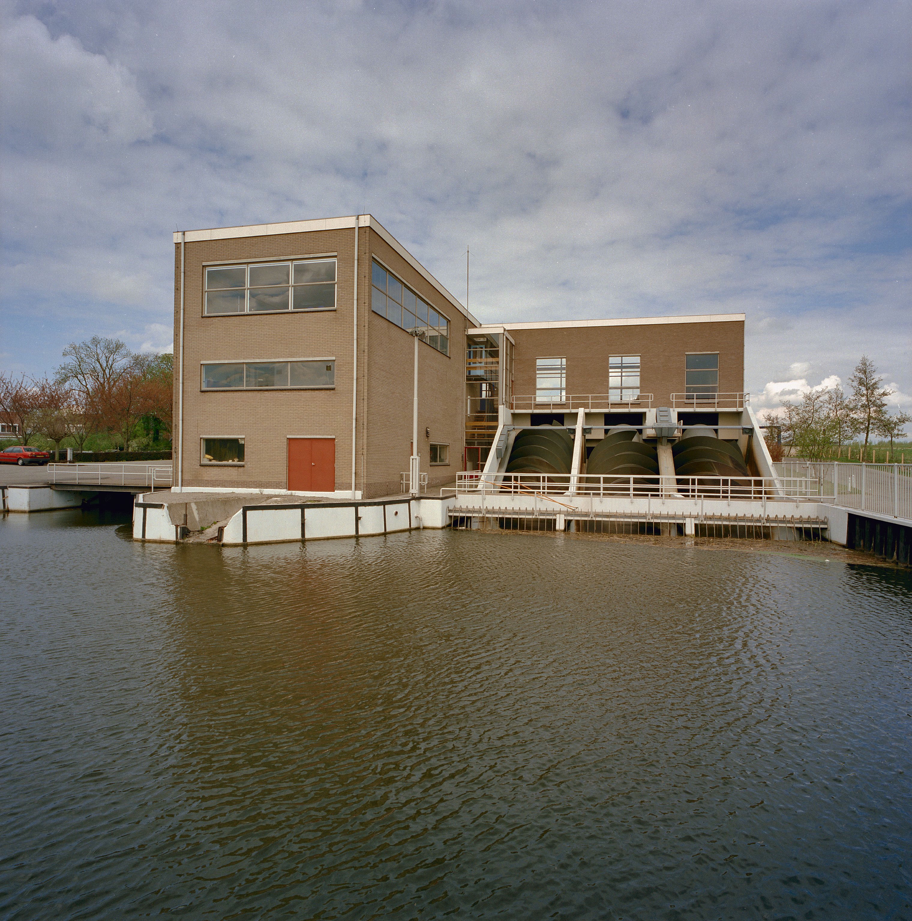 J.U. Smitgemaal: Overzicht gevel polderzijde van het stoomgemaal van de Nederwaard (opmerking: Gefotografeerd voor plaatsing op de Werelderfgoedlijst)